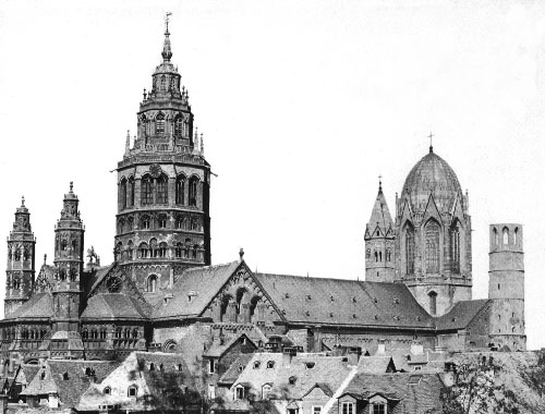 "Mainzer Dom mit Mollerschem Ei"